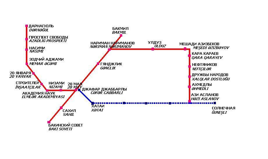 Схема Бакинского метро